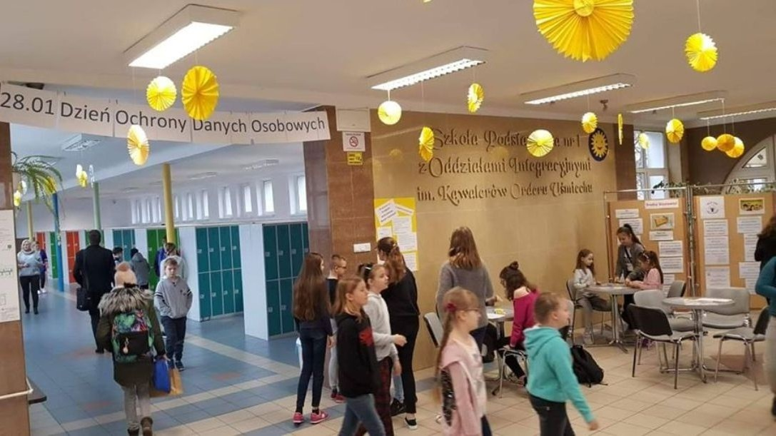 Przasnyska Szkoła Podstawowa nr 1